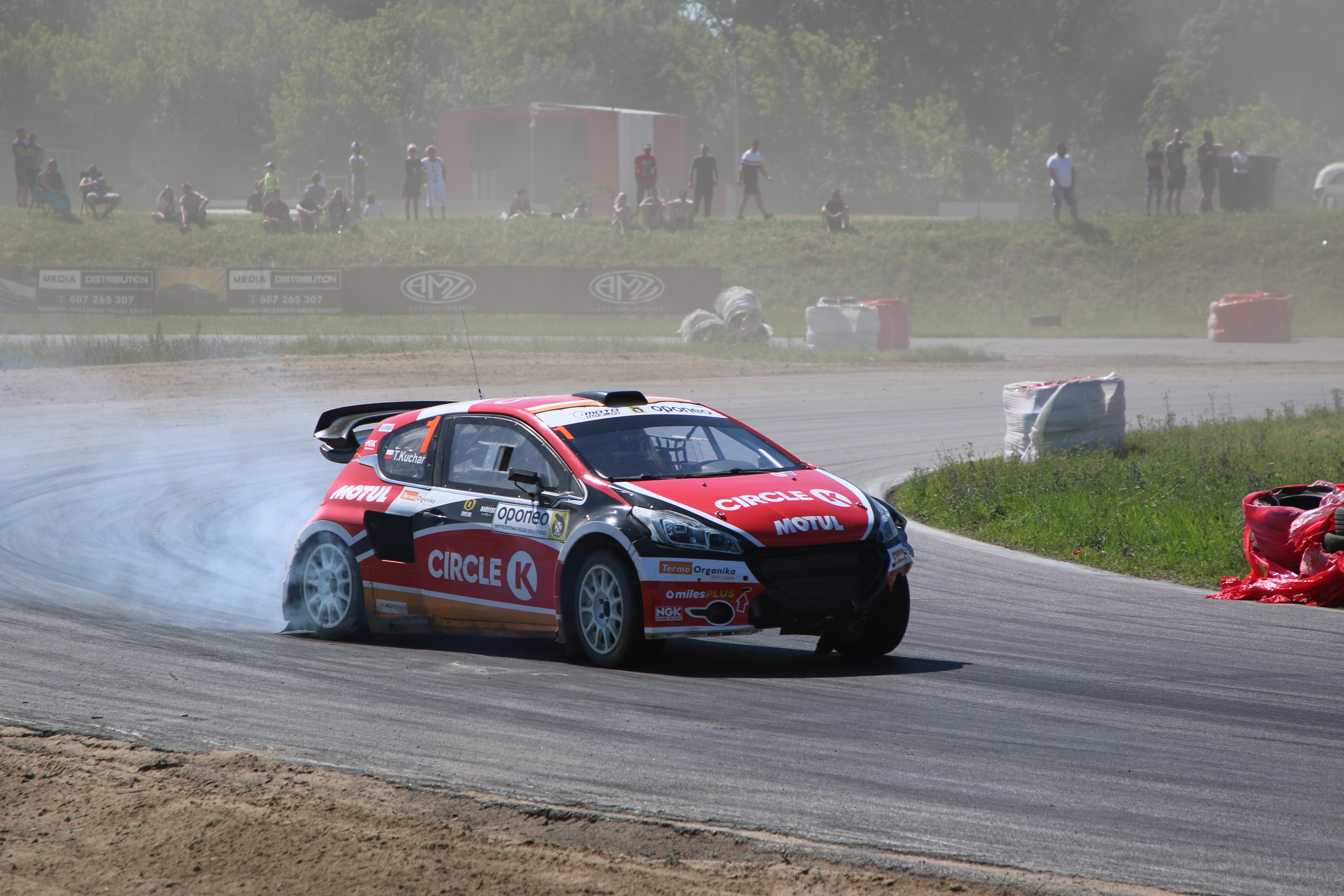 4 Runda OPONEO Mistrzostw Polski Rallycross - Toruń, Tomasz Kuchar